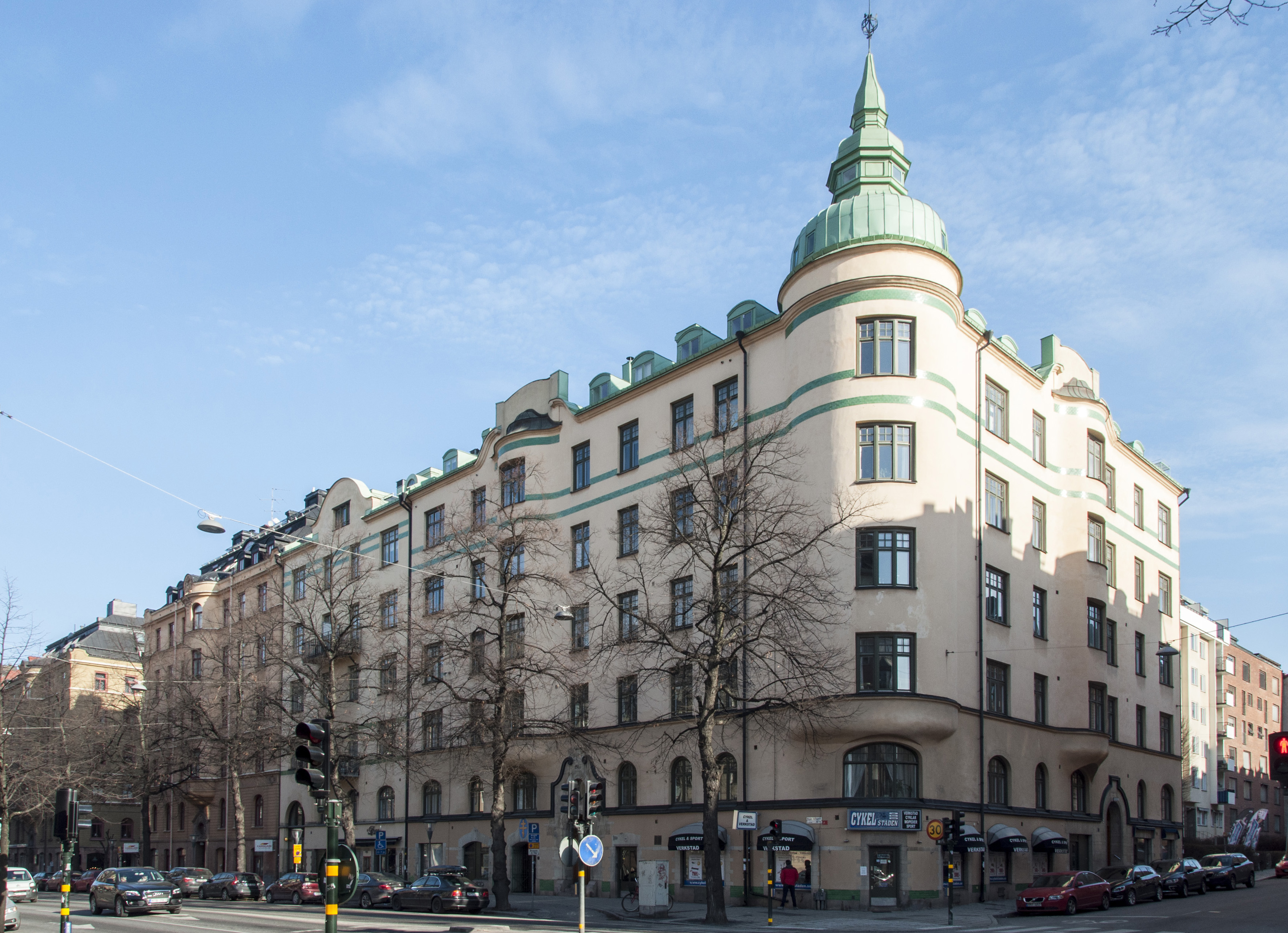 Morkullan 2, Stockholm, Birger Jarlsgatan 98, Surbrunnsgatan 16, Nybyggnadsår 1905 - 1907, Erik Eklundh (Arkitekt) Hilda Leuhusen (Byggherre) Lindståhl & Törnqvist (Byggherre) Wilhelm Dähn (Byggmästare) Wilhelm Dähn (Byggherre)